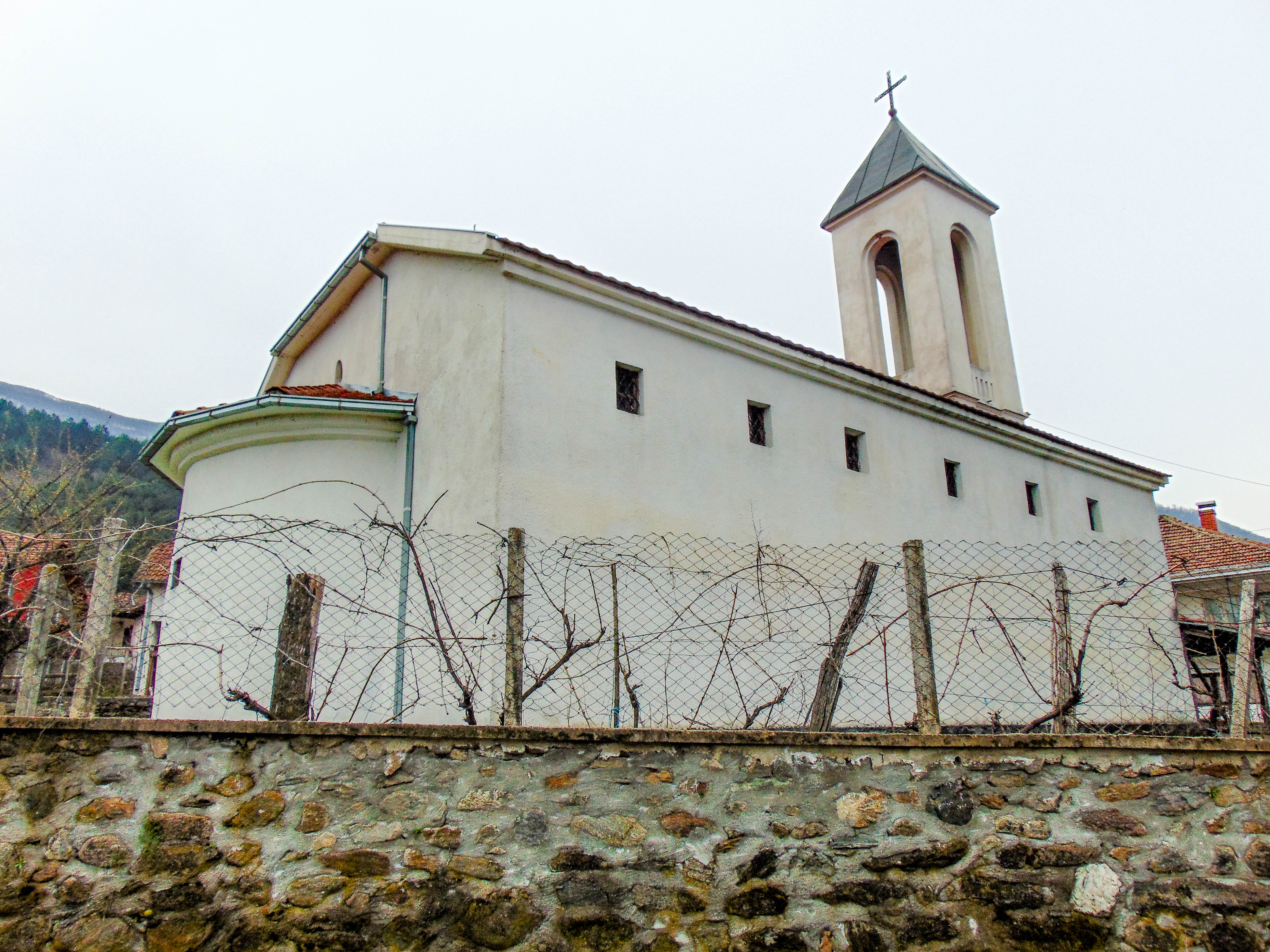 Црква „Св. Троица“ - Смолари